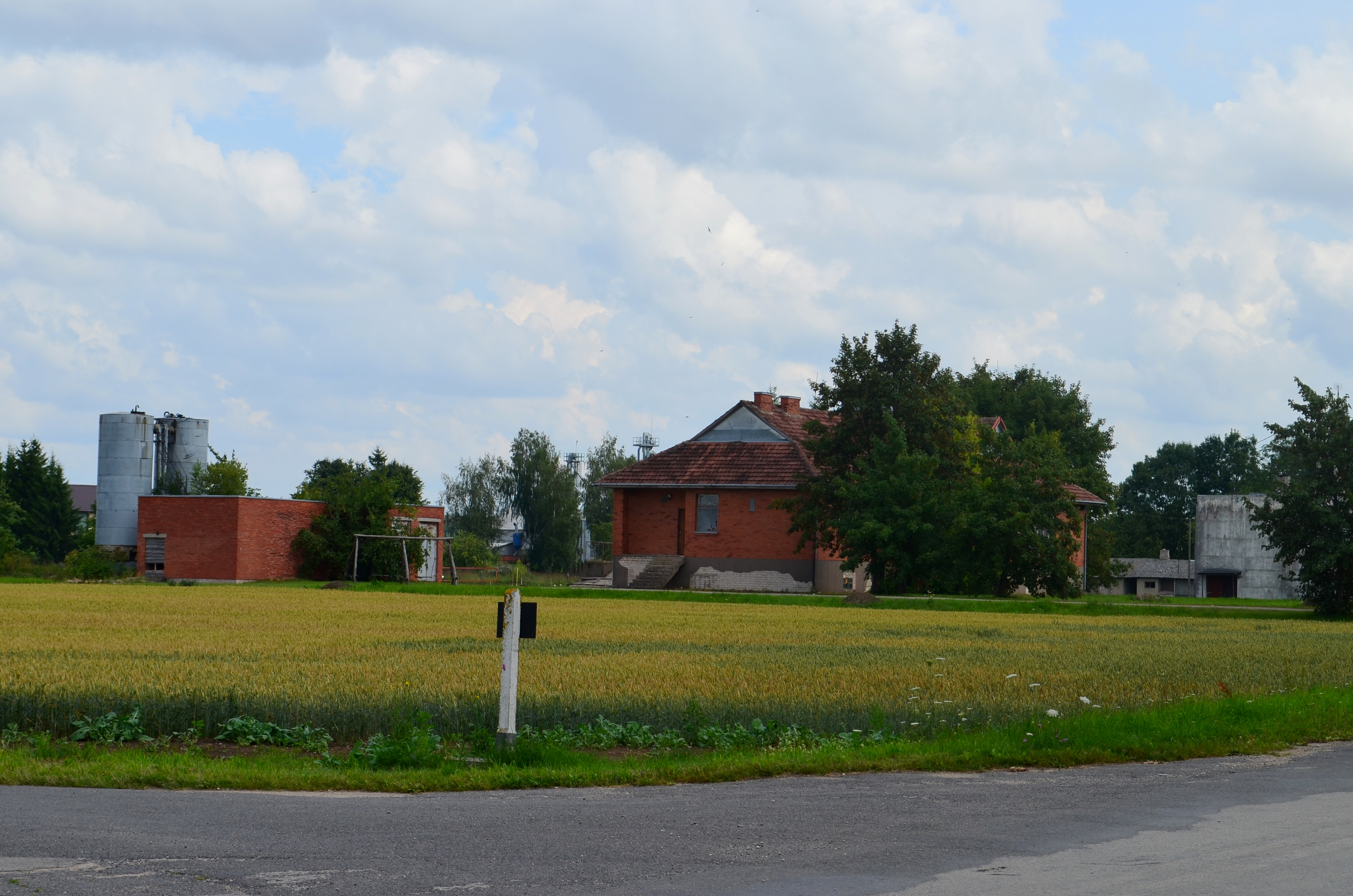 Daniūnų k., Ramygalos sen., Panevėžio raj.